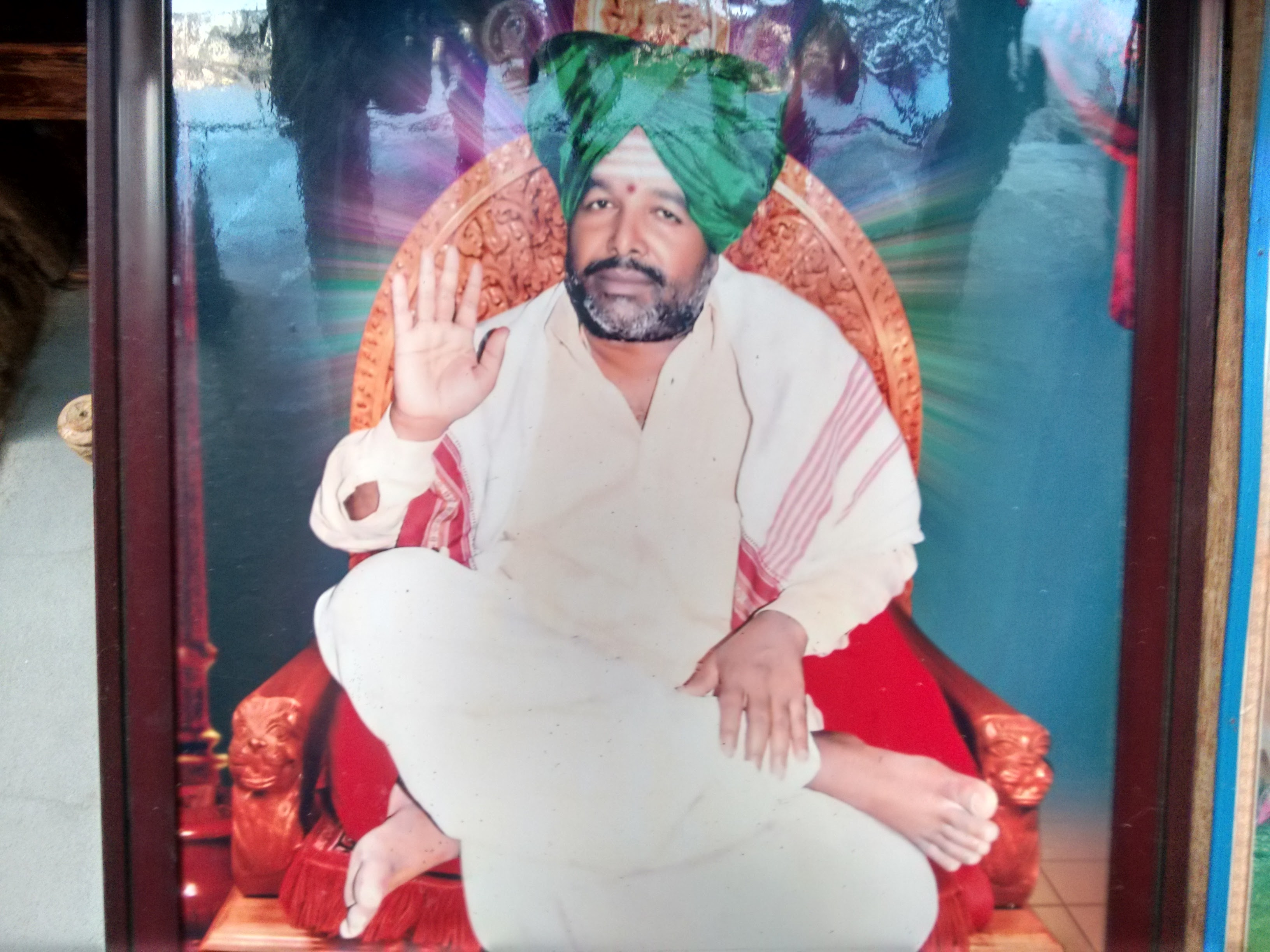 ಕನ್ನಡ: Shree Vedamurthy Shivayya Mahaswamiji Babaladi